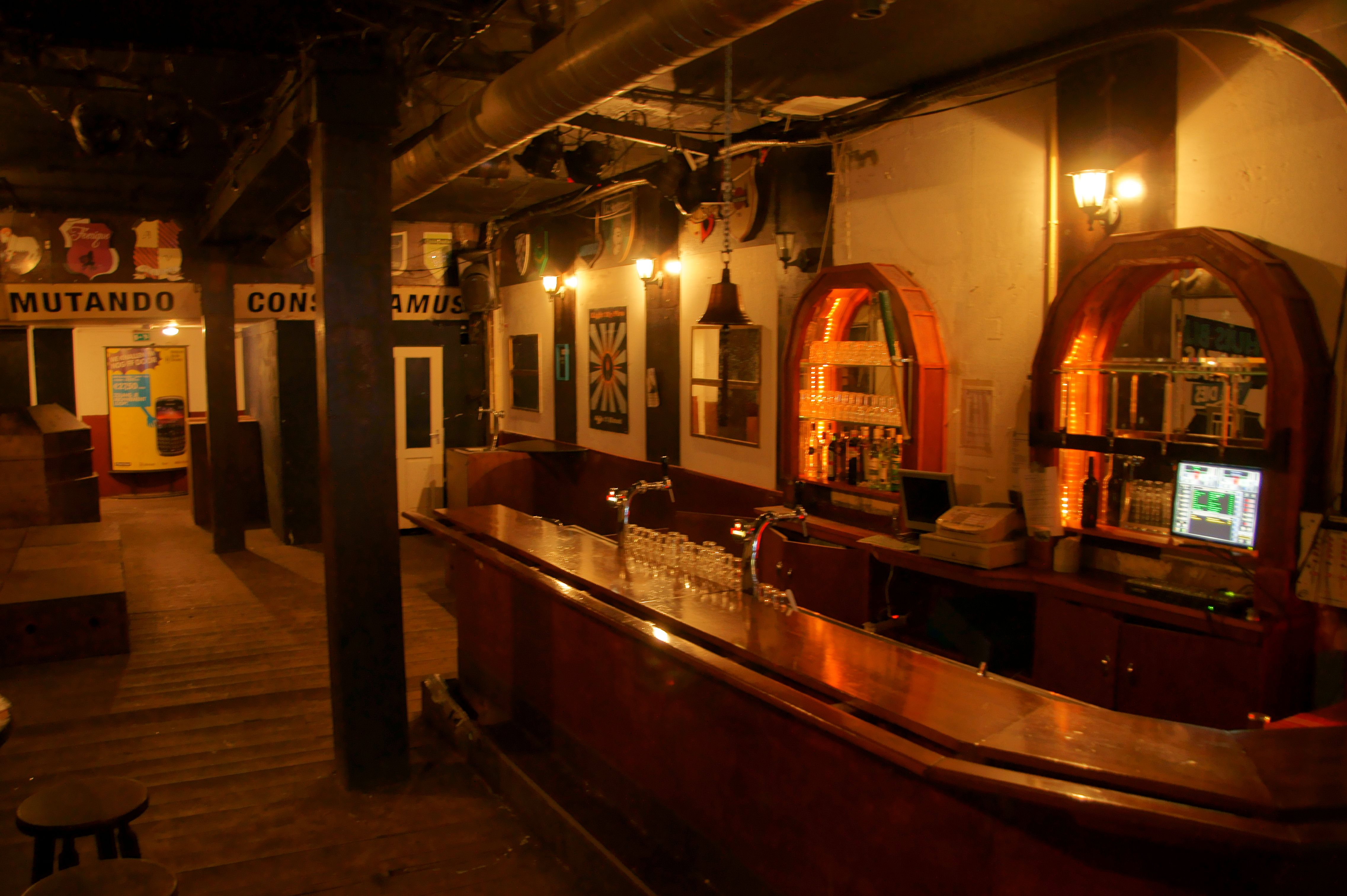 Middenbar Unitas S.G.